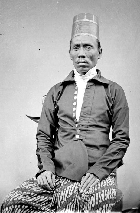 Negatief. Portret van de assistent-regent van Wonosobo te Bagelen, Midden-Java